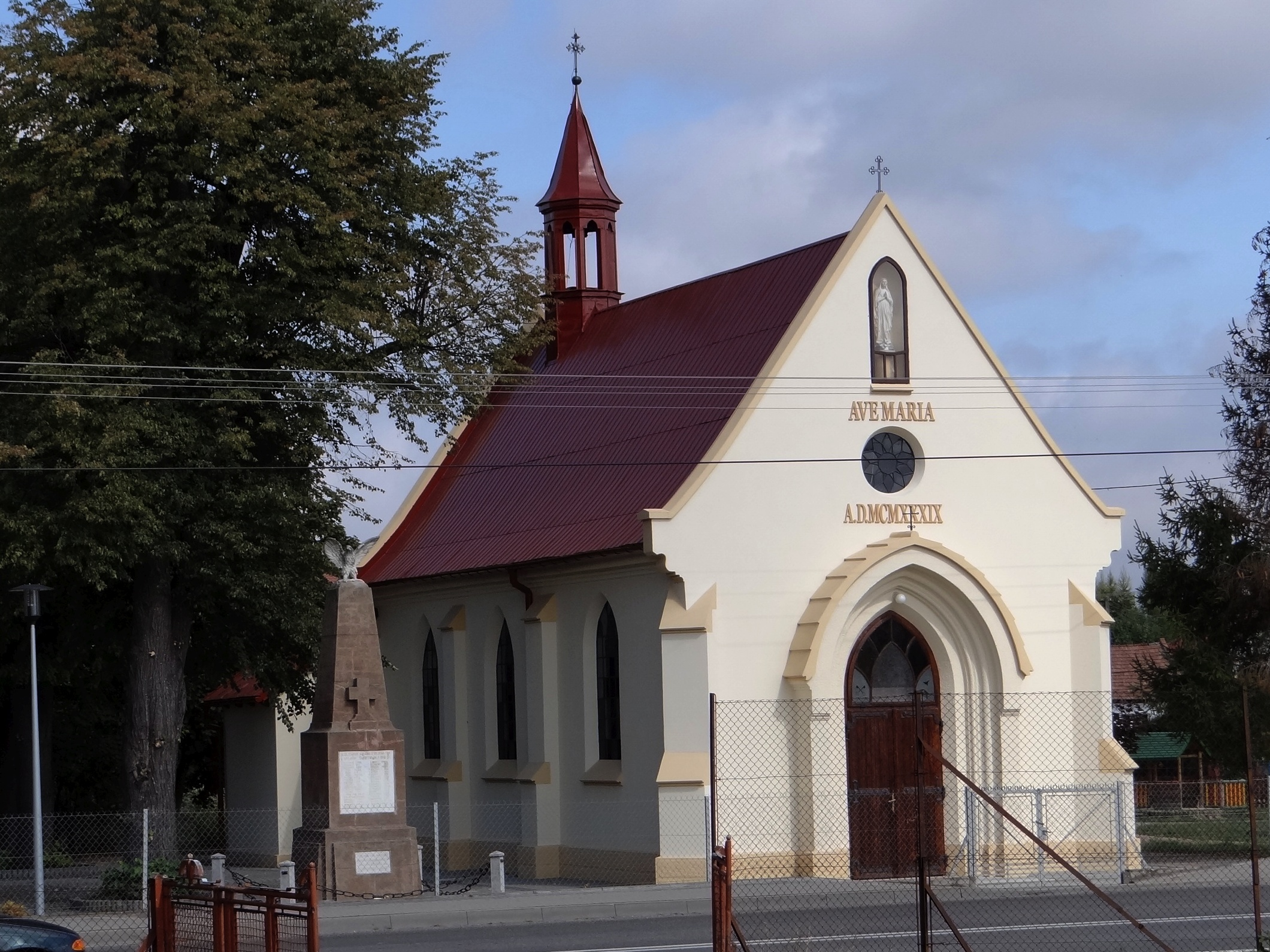 Stary kościół w Łętowicach